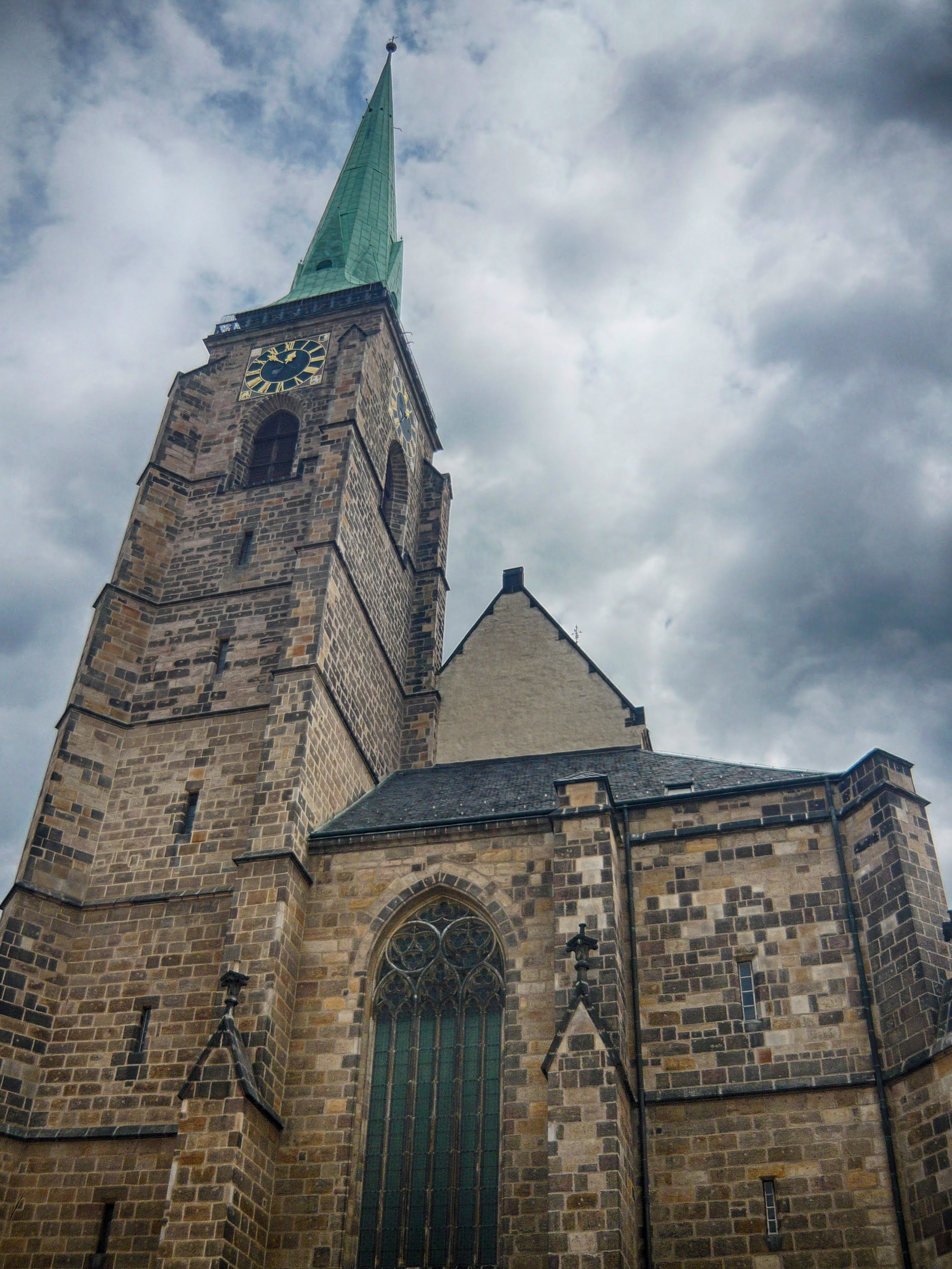 La Catedral de San Bartolomé o simplemente Catedral de Pilsen situada en la Plaza de la República